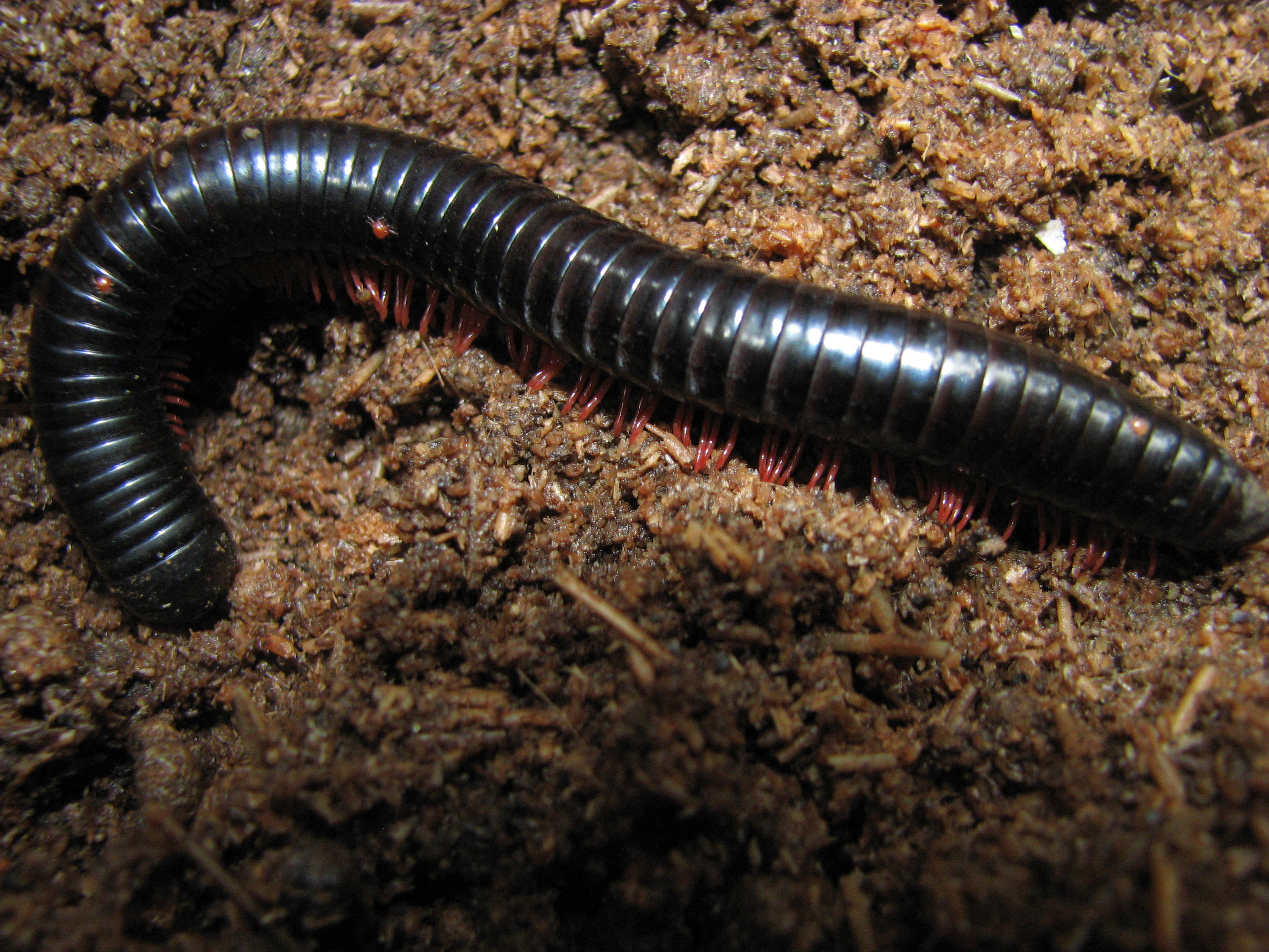 തേരട്ട